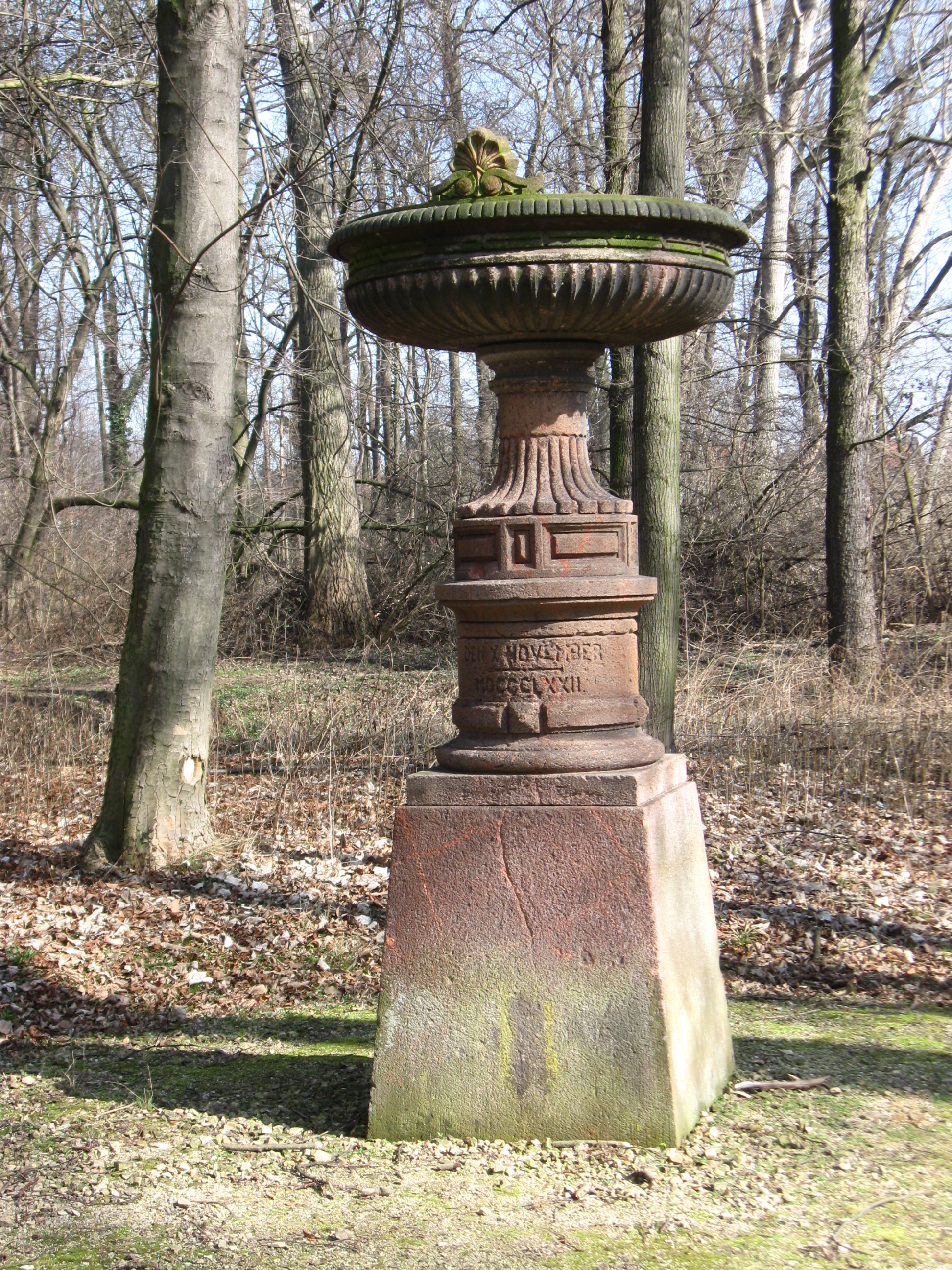 Hochzeitsvase: Blumenschale auf Postament, aus Rochlitzer Porphyrtuff, bezeichnet 10.11.1872, Denkmal zur goldenen Hochzeit König Johann und Königin Amalie